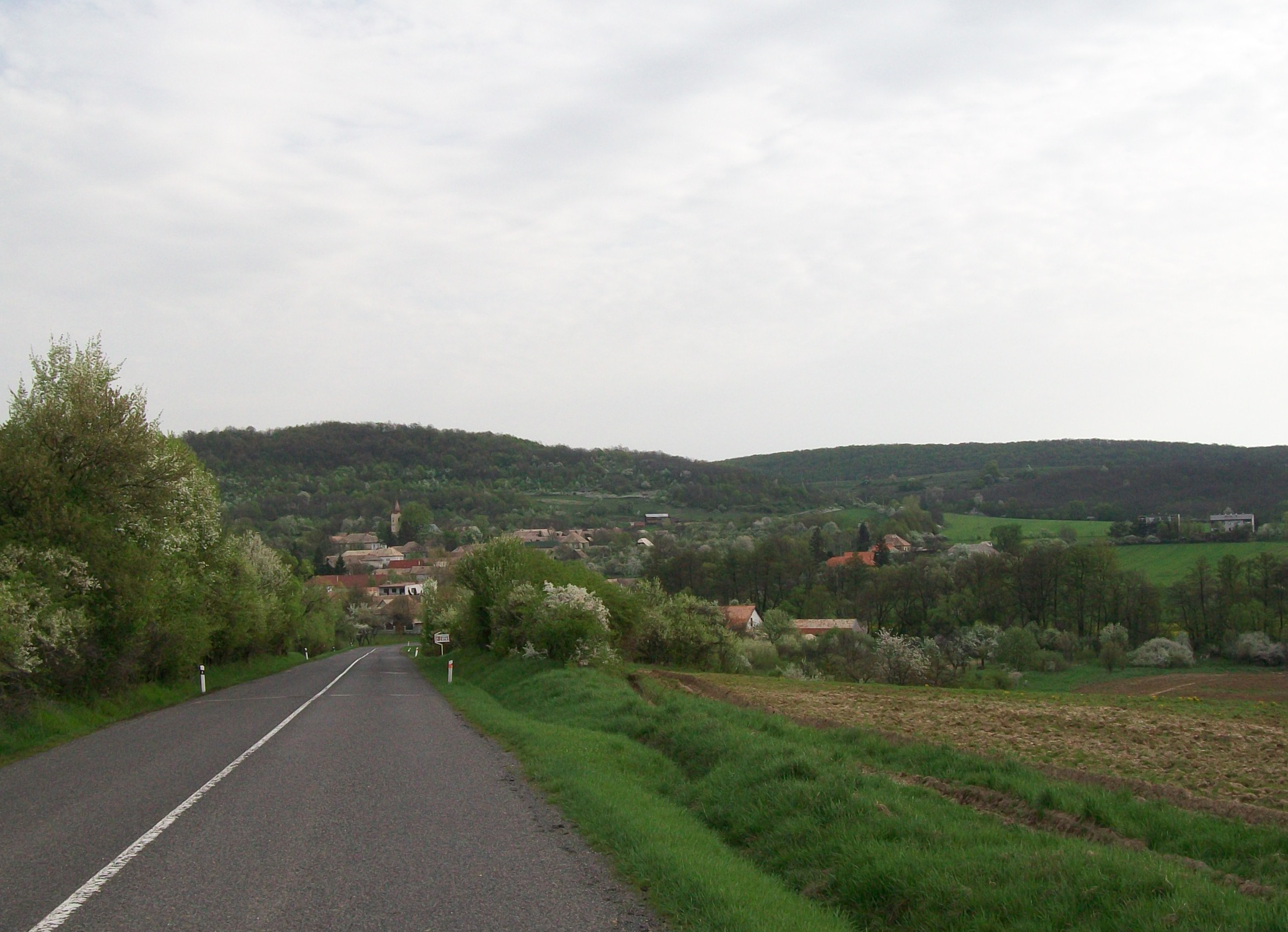 Pohľad na obec Ľuboreč